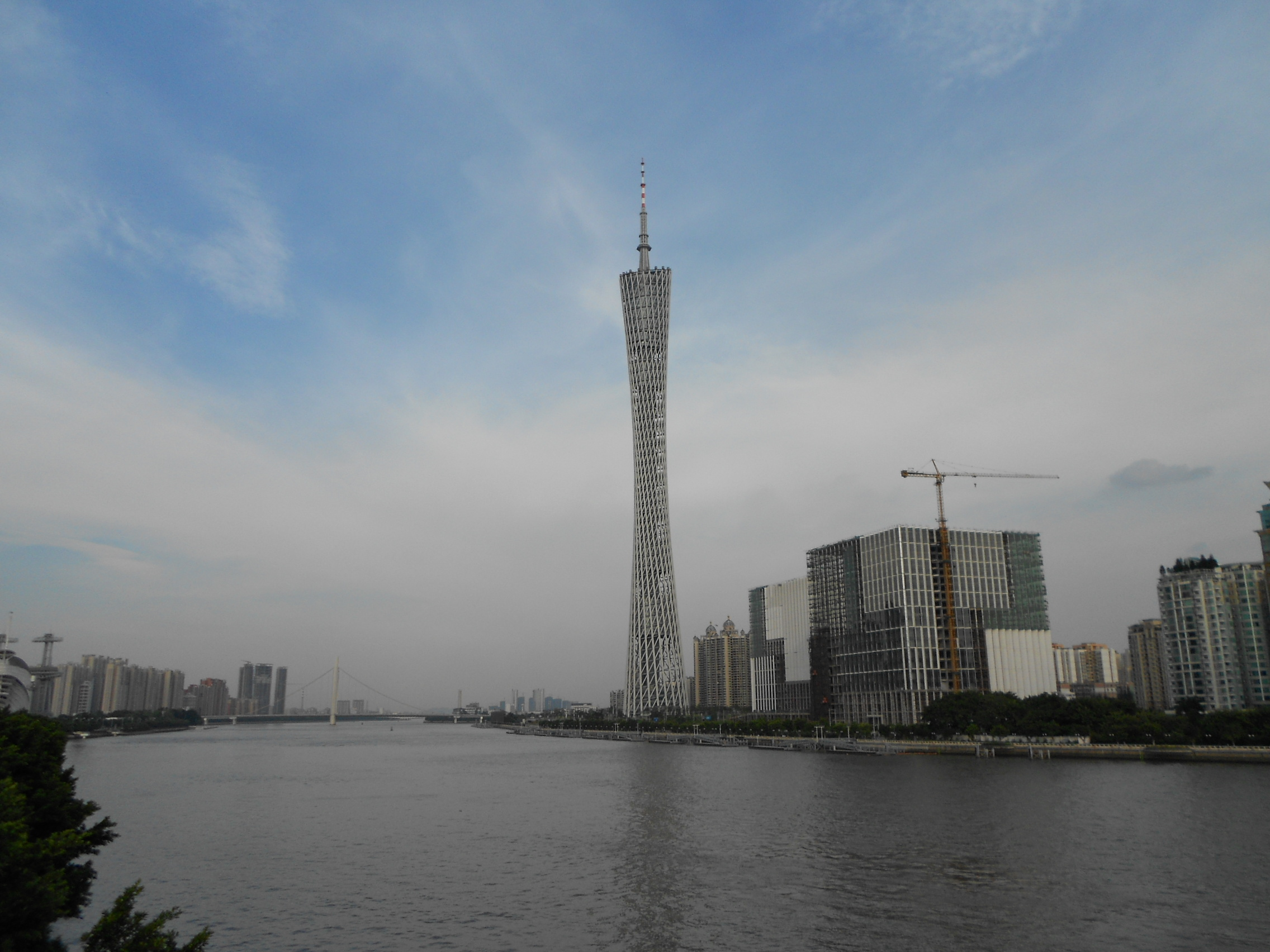 廣州塔和鄰近的廣州市廣播電視台新址。